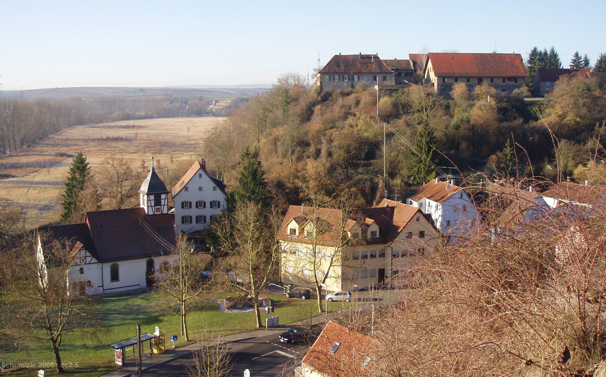 Blick von den Weinbergen am Neckar südwestlich über Kirche und Schloss in Heilbronn-Klingenberg